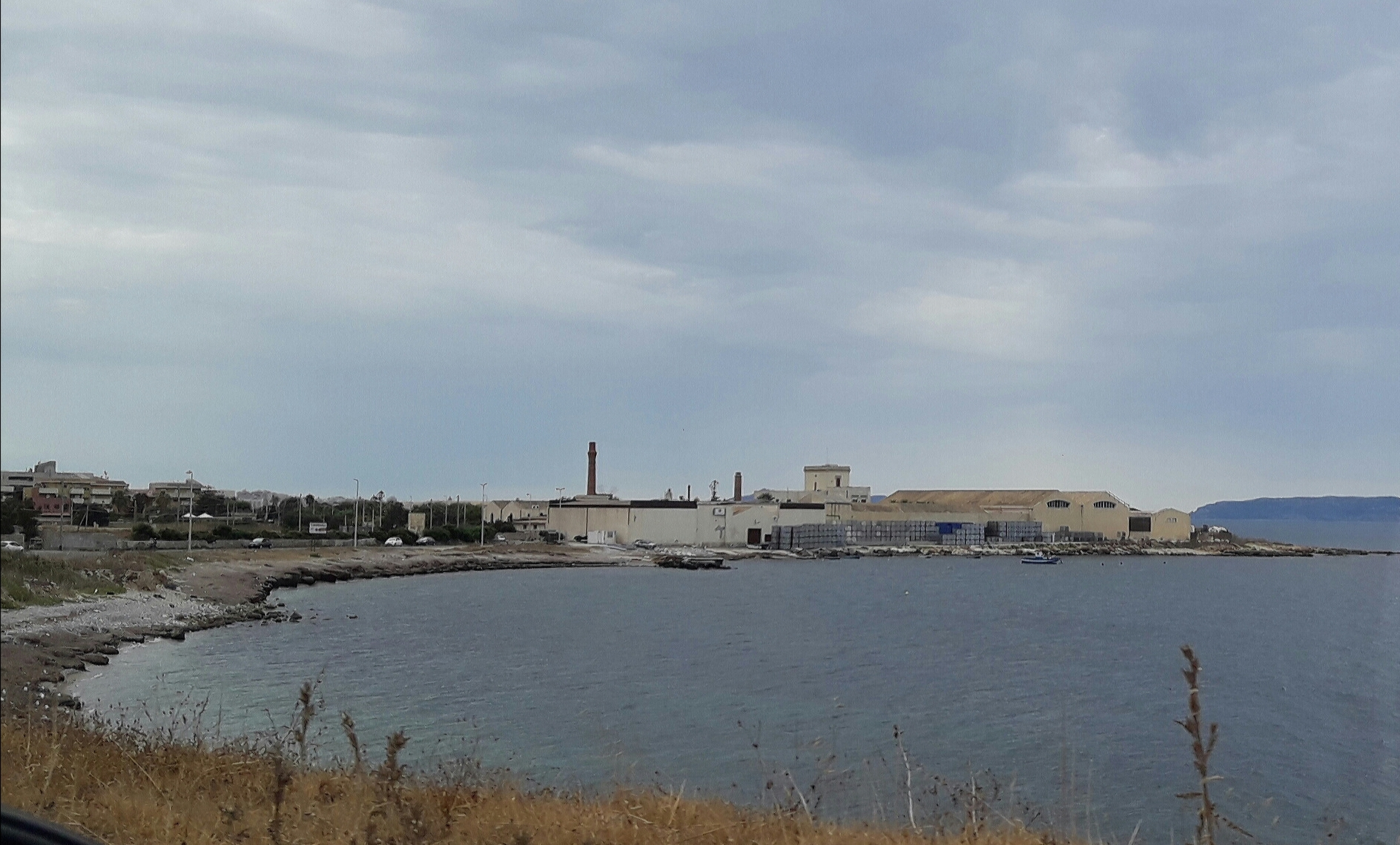 Tonnara San Cusumano e stabilimento conserviero "Castiglione", Trapani, Sicily